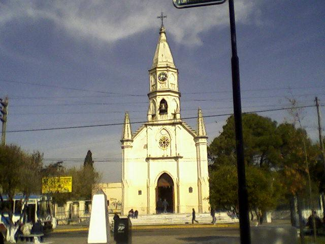 This is Nuestra Señora de la Merced church in Merlo partido, Buenos Aires province.